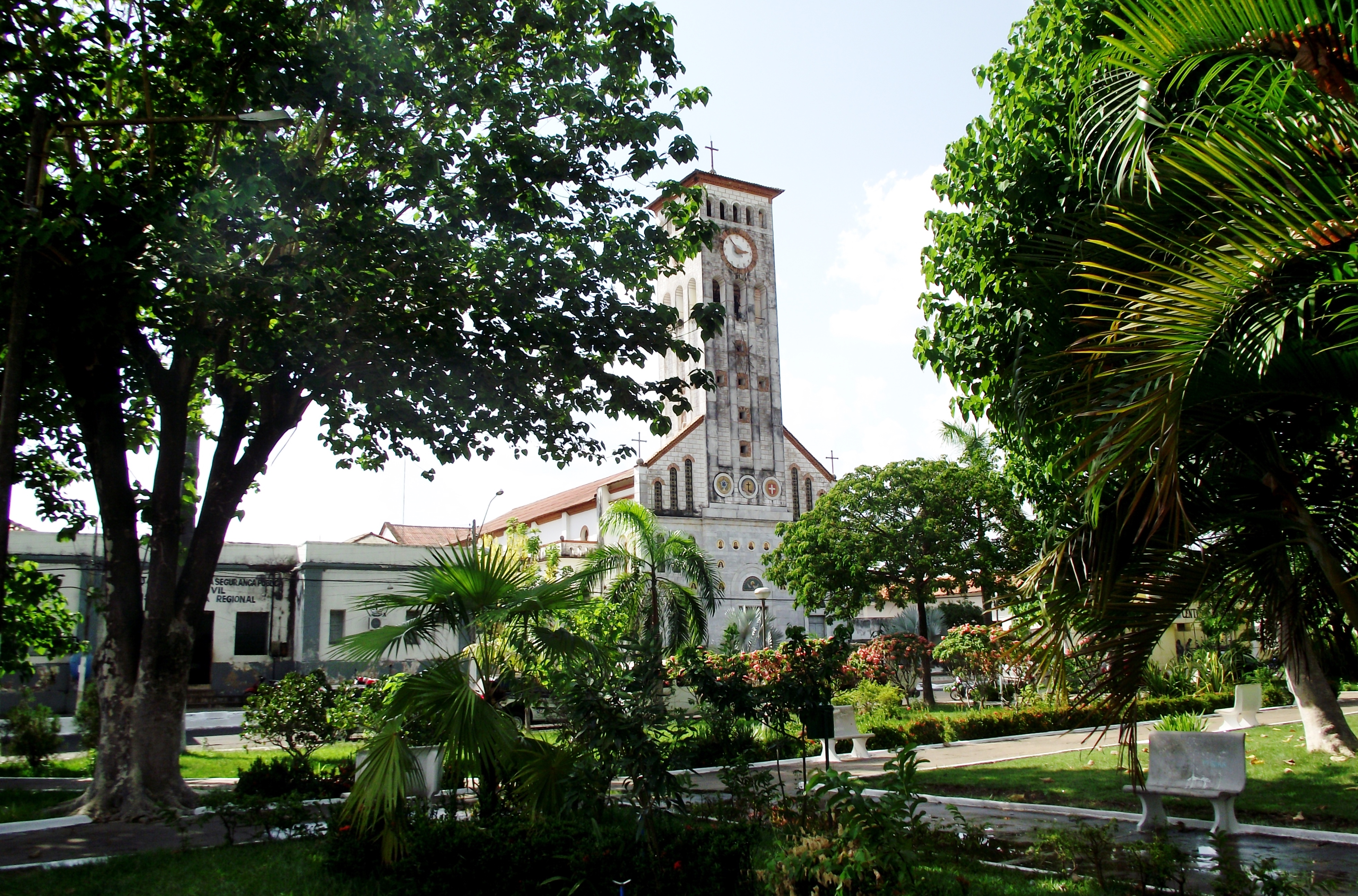 Igreja de Nossa Senhora da Conceição. Barra do Corda (MA).